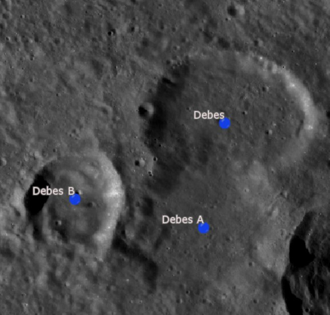 Cráter lunar Debes. Cráteres satélite (LRO)